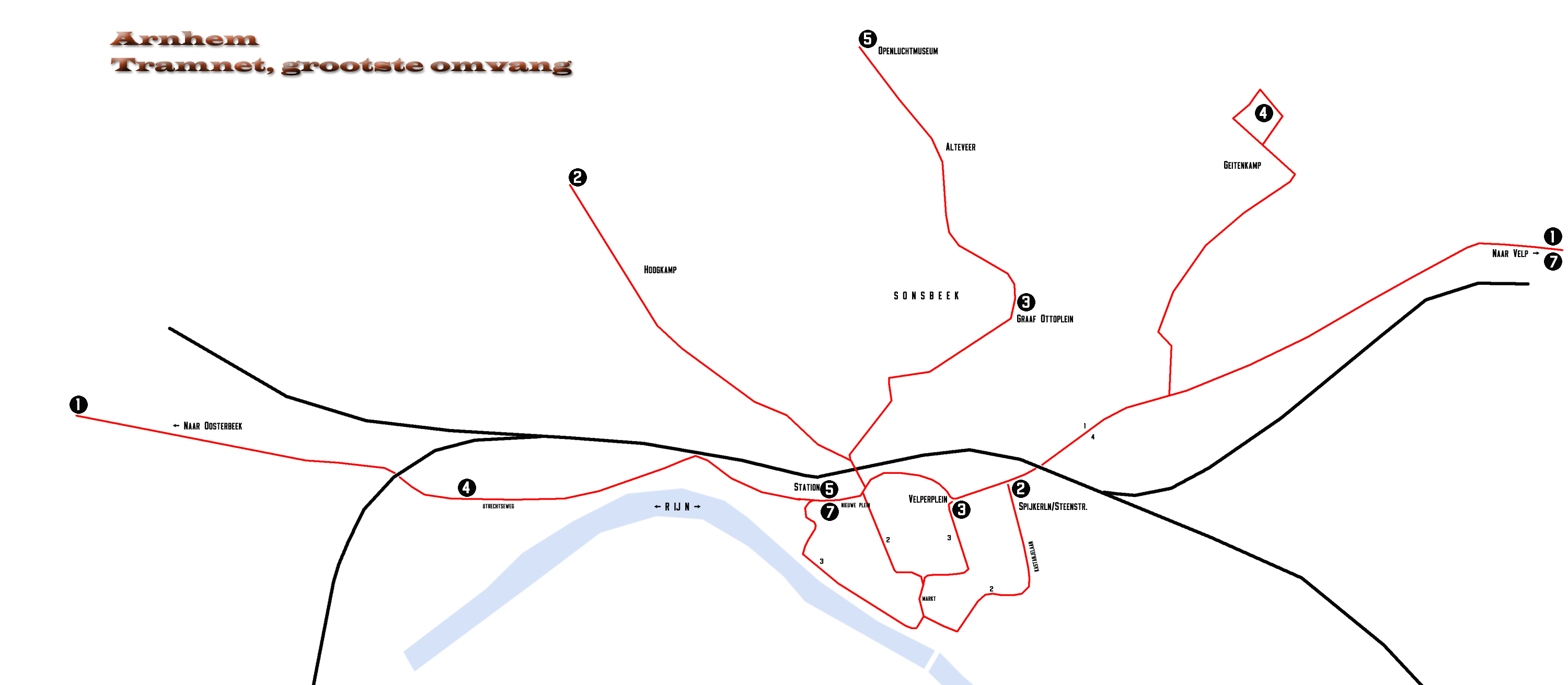 Schematische weergave tramnet Arnhem